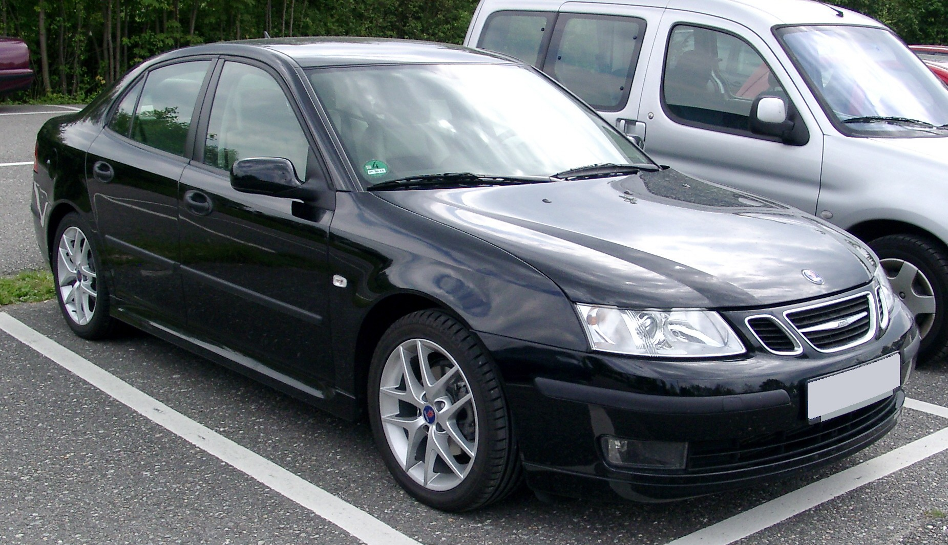 Saab 9-3